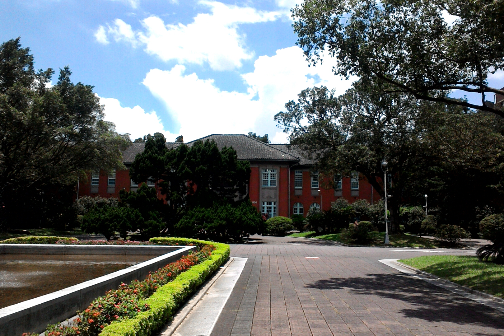 國立台灣大學行政大樓,台北市大安區學府次分區學府里